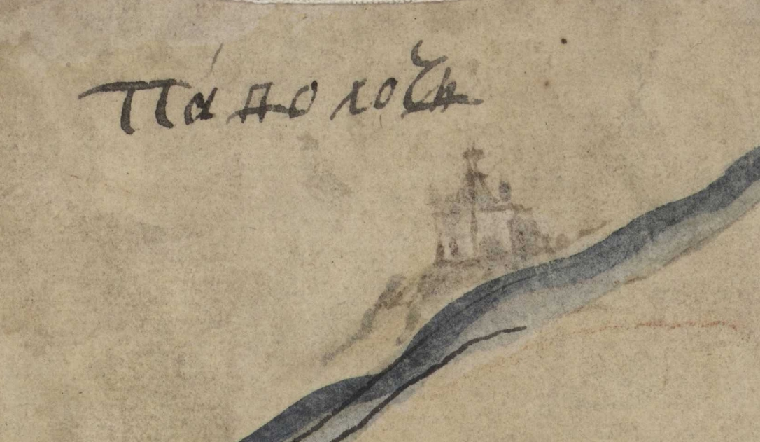 Фрагмент карти Київської губернії. XVIII століття. РГАДА, ф. 192, оп. 1, Киевская губ., № 5.